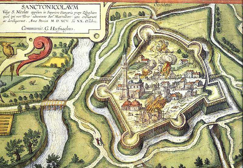 A törökszentmiklósi vár